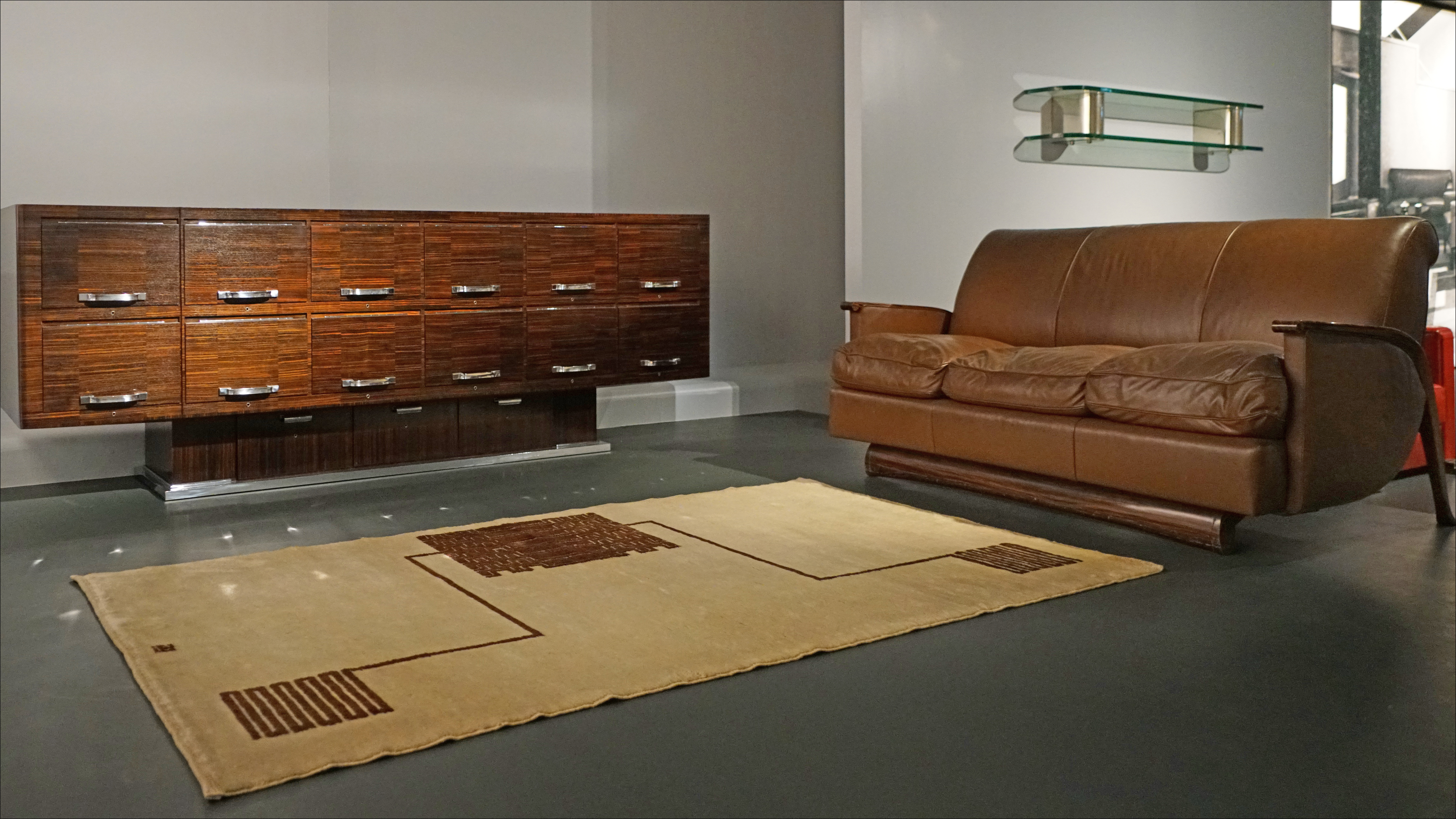 Le cabinet de travail du Maharajah d'Indore Mobiliers de Jacques-Émile Ruhlmann (1879-1933) À gauche, meuble d'appui, 1932, ébène de macassaret bronze chromé, Paris, Galerie Vallois À droite, Canapé, 1932, ébène de macassar et cuir, Collection particulière Le Musée des Arts Décoratifs met à l’honneur l’extraordinaire figure du maharajah d’Indore qui donne libre cours à son goût d’avant-garde artistique et décorative en créant, en Inde, un univers moderne unique. Personnalité visionnaire du milieu culturel européen des années 1920-1930, il est le commanditaire de la toute première construction moderniste de son pays : le palais Manik Bagh (1930-1933), témoignage de l’effervescence de la scène artistique de l’époque. Extrait du site officiel L'exposition "Moderne Maharajah, un mécène des années 1930" au Musée des arts décoratifs, Paris Les photographies des oeuvres majeures de cette exposition (mobiliers, portraits) sont interdites, la plupart des oeuvres non interdites sont sous droit Adagp, leur diffusion doit rester dans le cercle d'amis